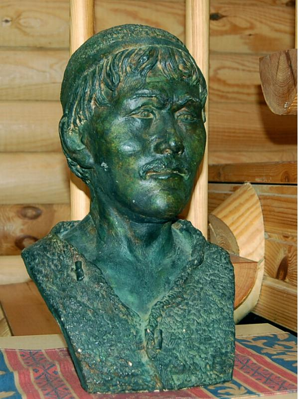 5000 tuhat aastat tagasi Valmas elanud mehe luustiku järgi tehtud rekonstruktsioon M. Gerassimovi poolt.